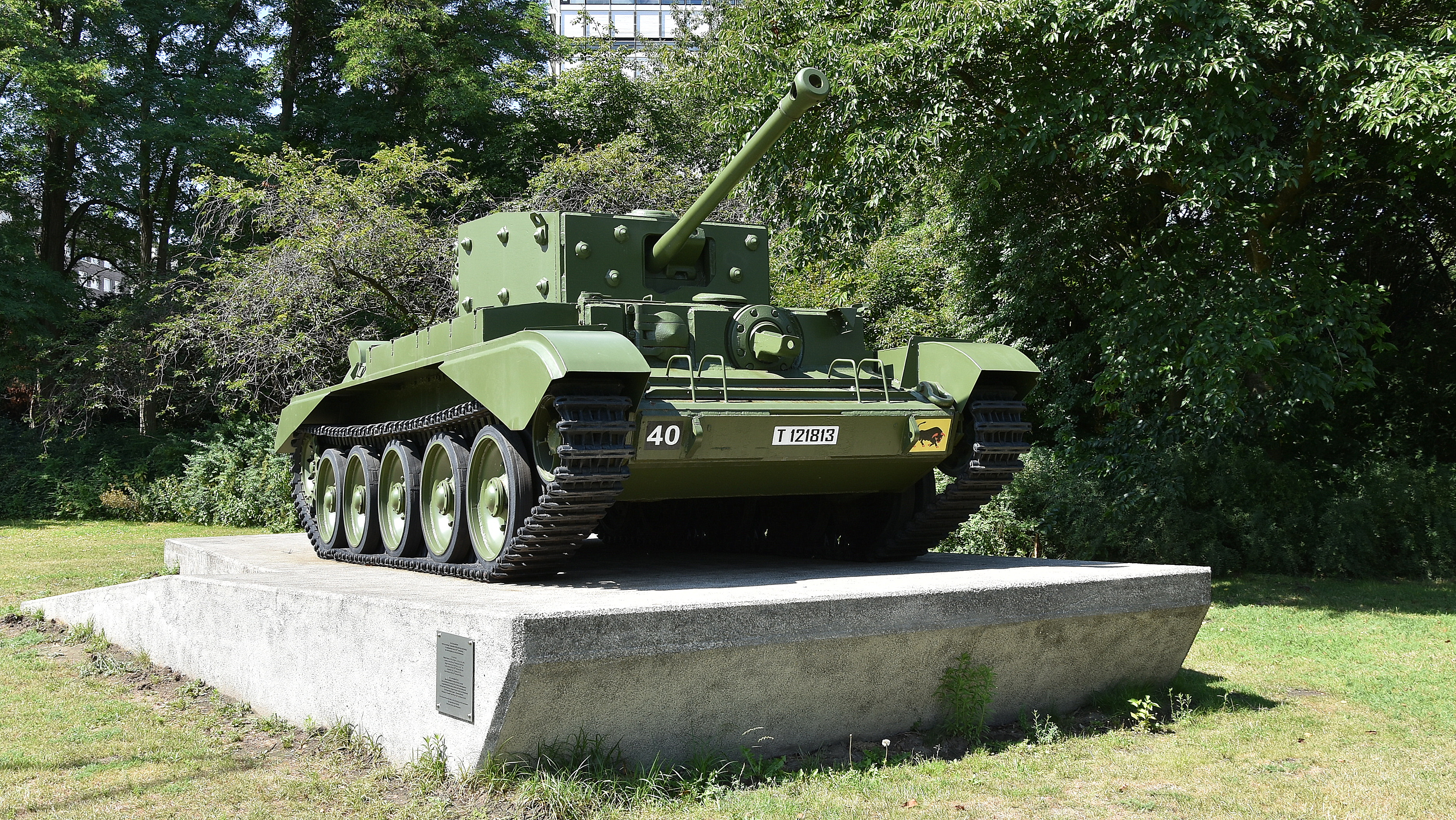 Tankmonument (Antwerpen) 29-07-2019 12-30-37 — Cromwell Mark V (T 121813) This photo of immovable heritage has been taken in the Flemish Region